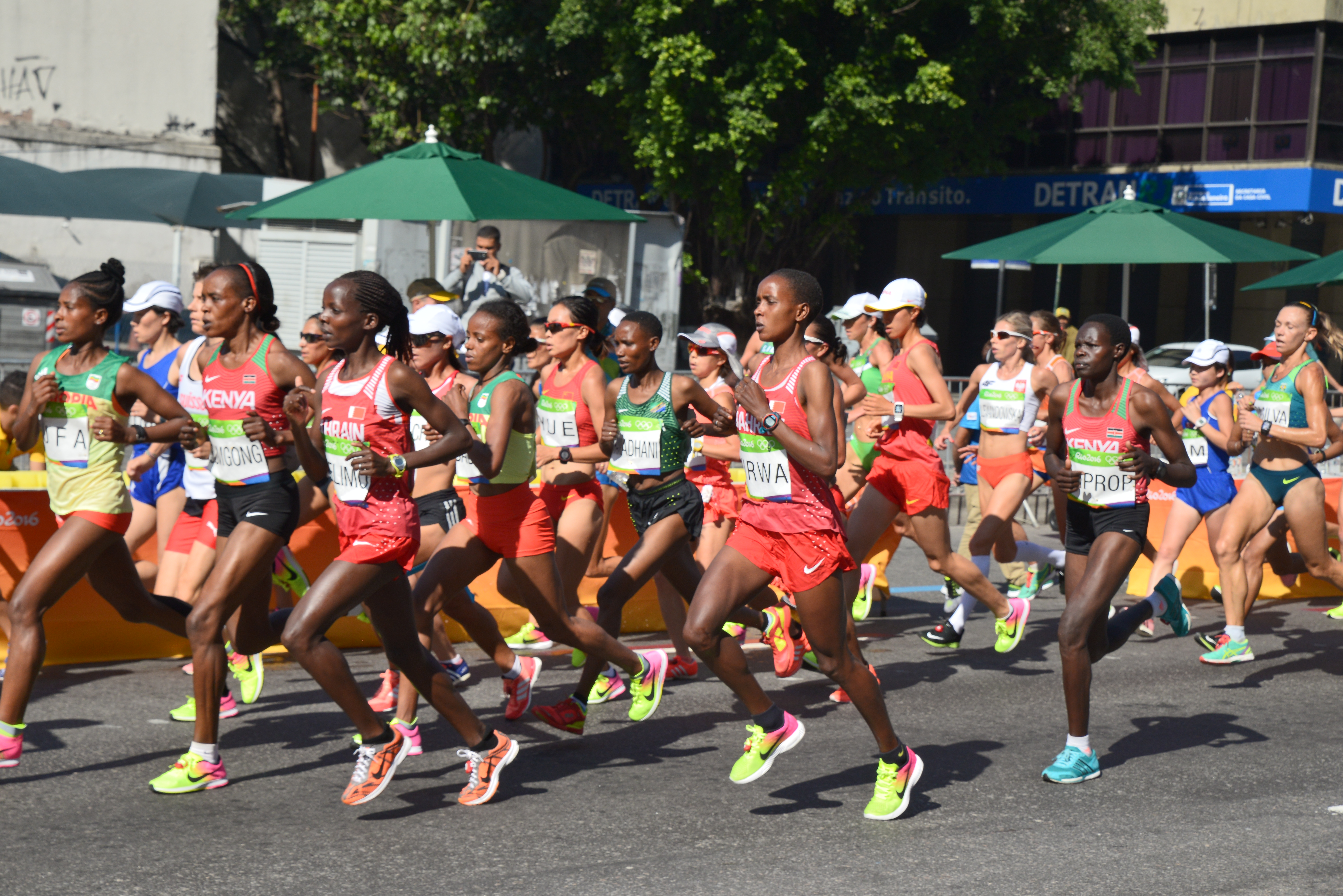 Passage du marathon des jeux olympiques de Rio 2016 dans le centre de Rio